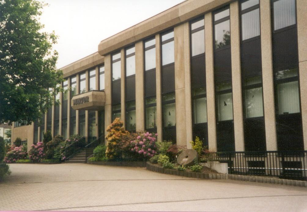 Martor KG Solingen